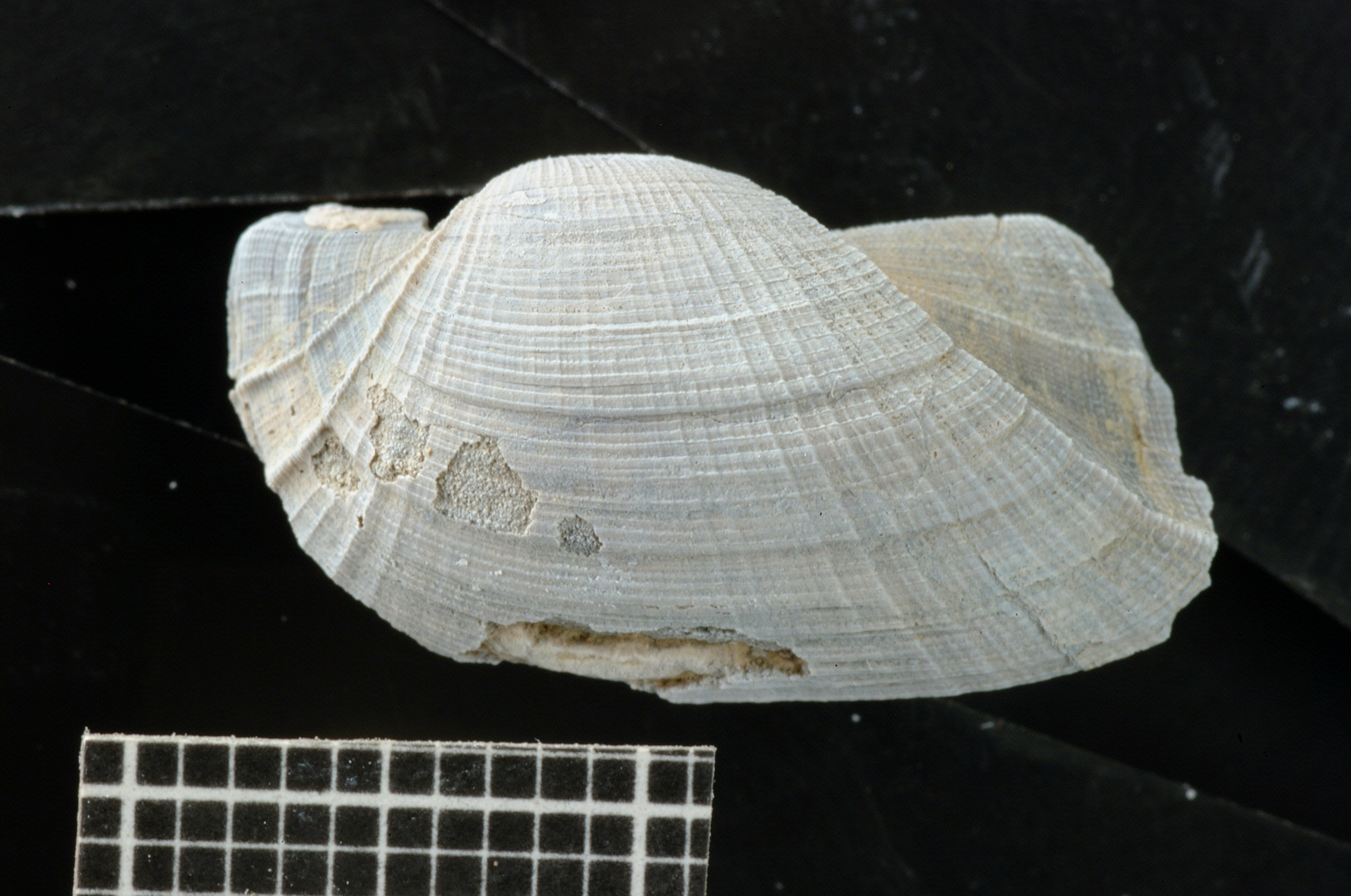 Ejemplar articulado del bivalvo fósil Grammatodon securis proveniente de la Formación Agrio (Cuenca Neuquina) en Argentina. Vista izquierda.